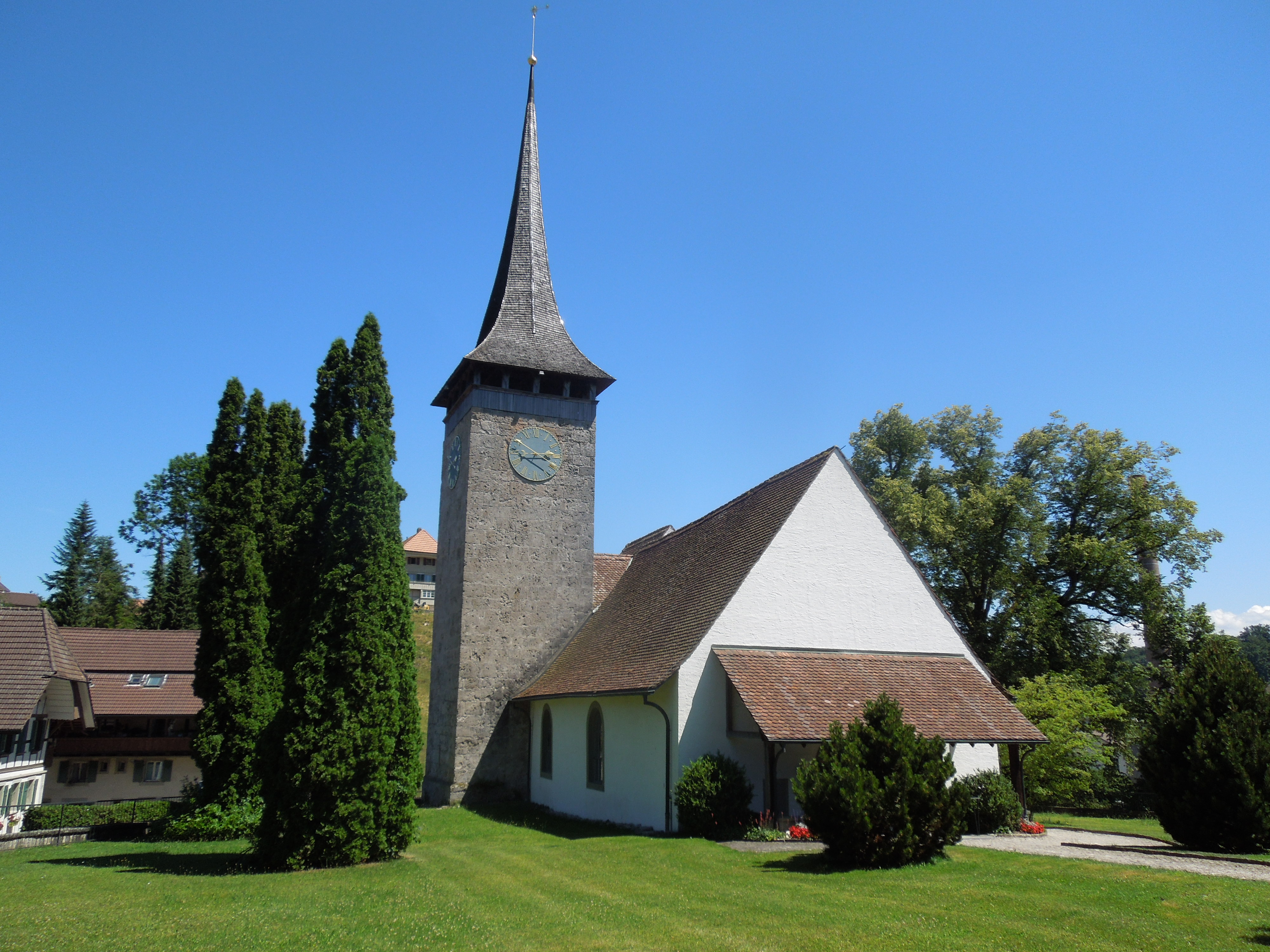 Kirche in Neuenegg im 20. Jahrhundert